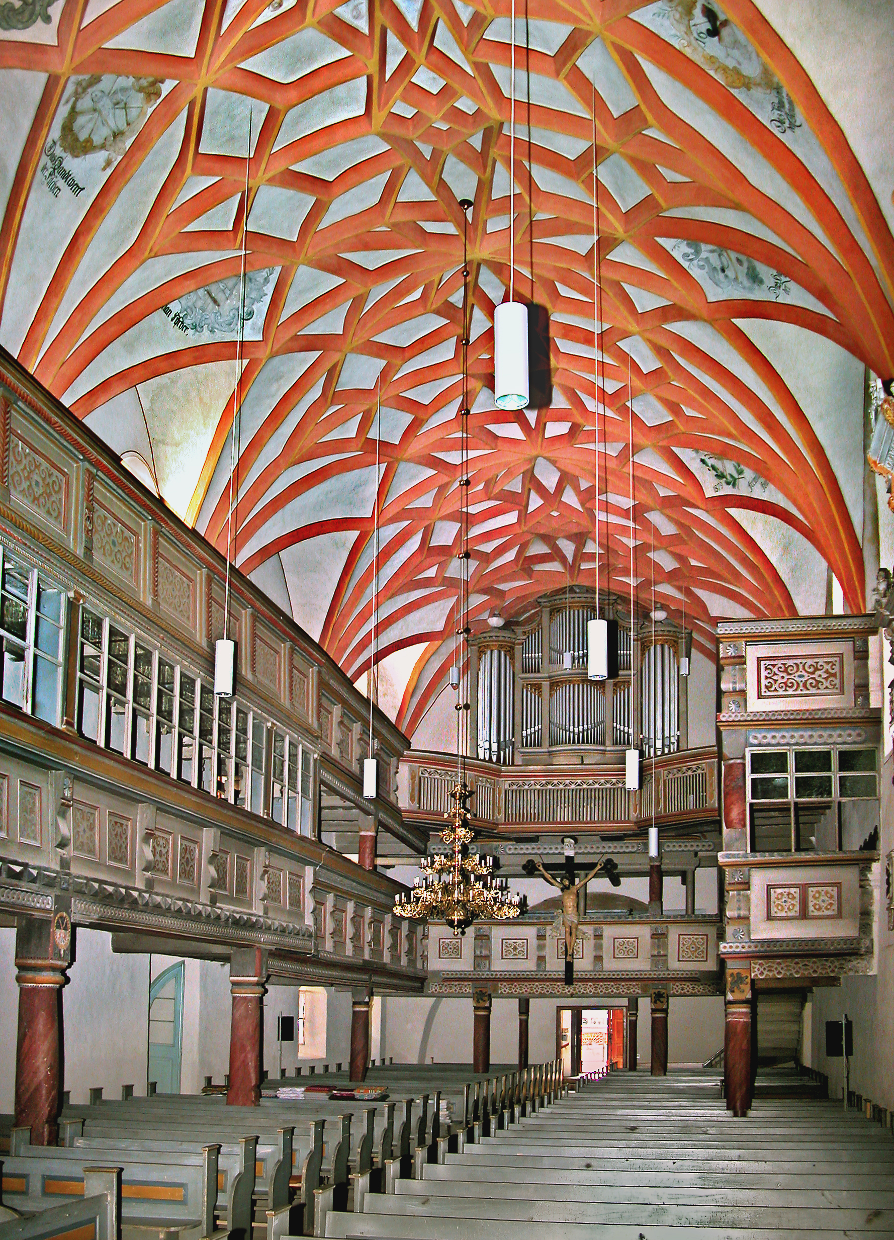 10.04.2009 04874 Belgern (Belgern-Schildau), Kirchgasse (GMP: 51.484091,13.127551: St. Bartolomäus Kirche. 1267 erstmals erwähnt, erhielt die St. Bartholomäus Kirche 1509 - 1512 ihre heutige Gestalt. Mende-Orgel von 1844. [DSCN36233.TIF]20090410730DR.JPG(c)Blobelt